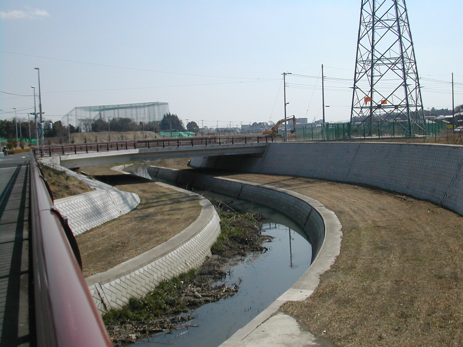 Ohoririver,toTeganuma,KashiwaandNagareyama,chiba,Japan